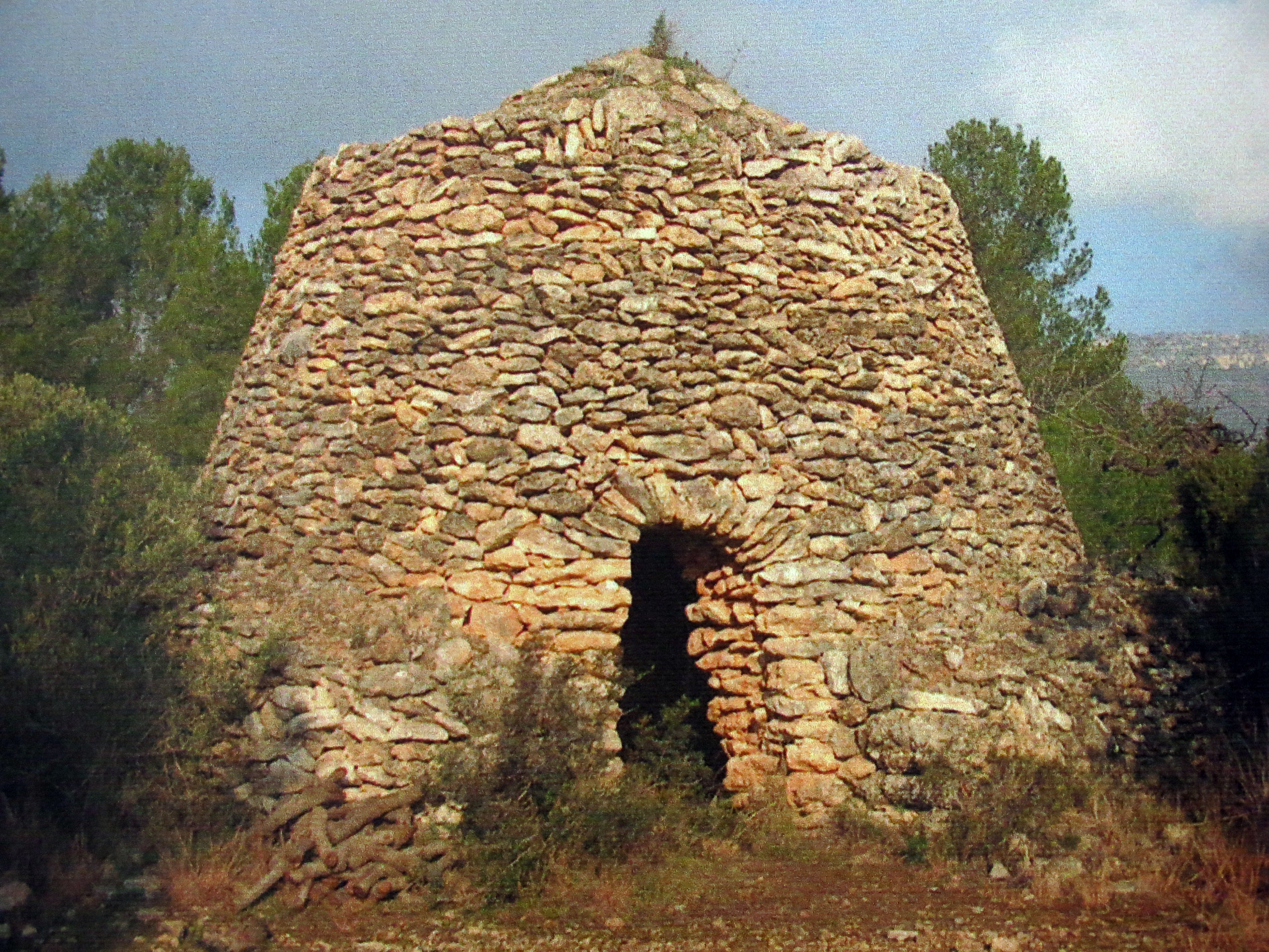 Conjunt de barraques de pedra seca (Mont-roig del Camp)